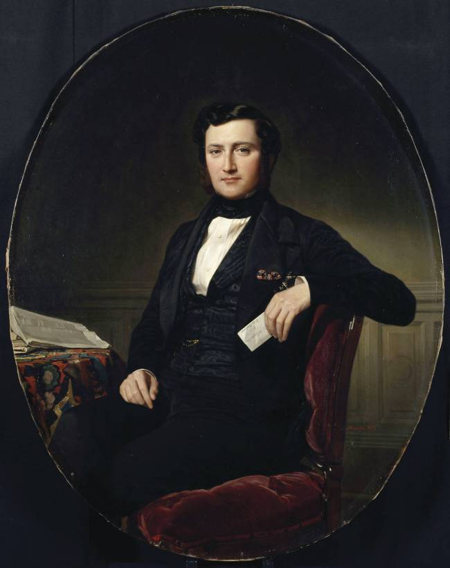 Portrait du baron Daniel Bernhard de Weisweiller (1814-1892)